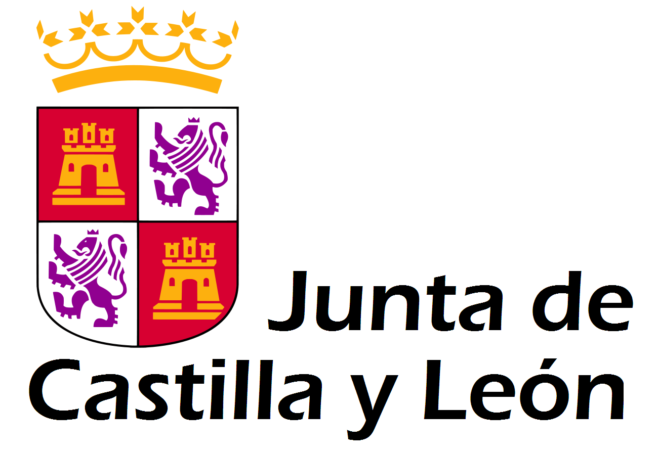 Anagrama de la Junta de Castilla y León